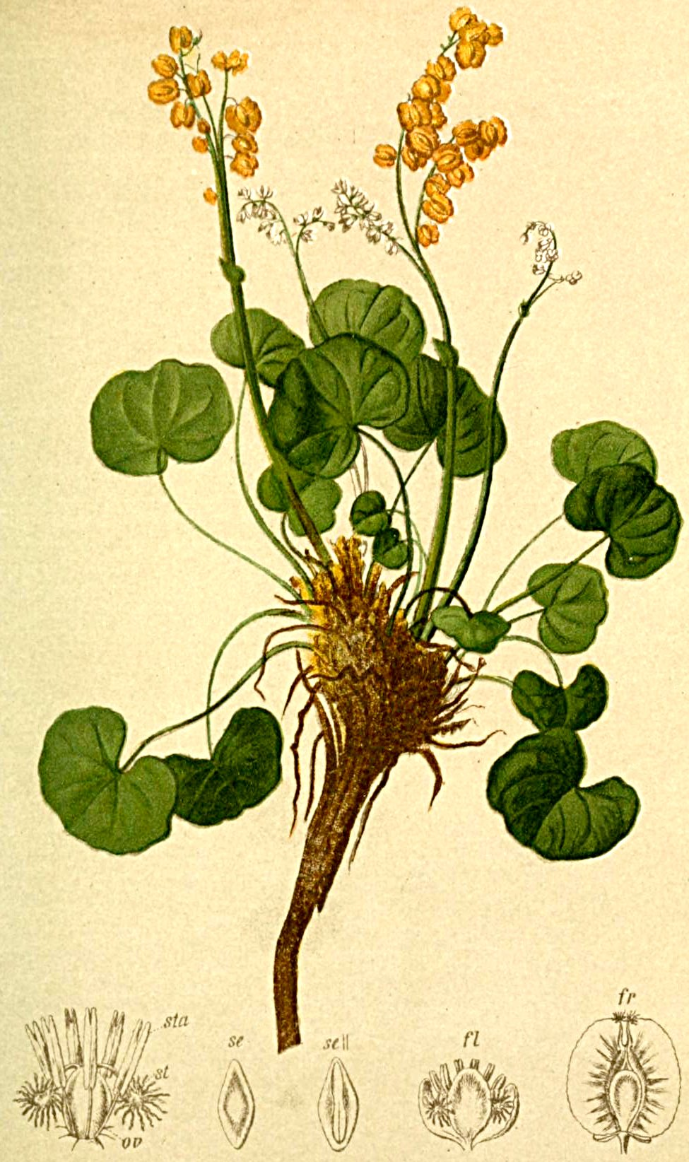 Oxyria digyna